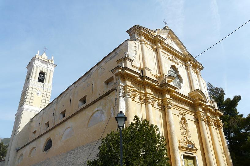 Foto varie delle chiese di Castellaro, Liguria, Italia